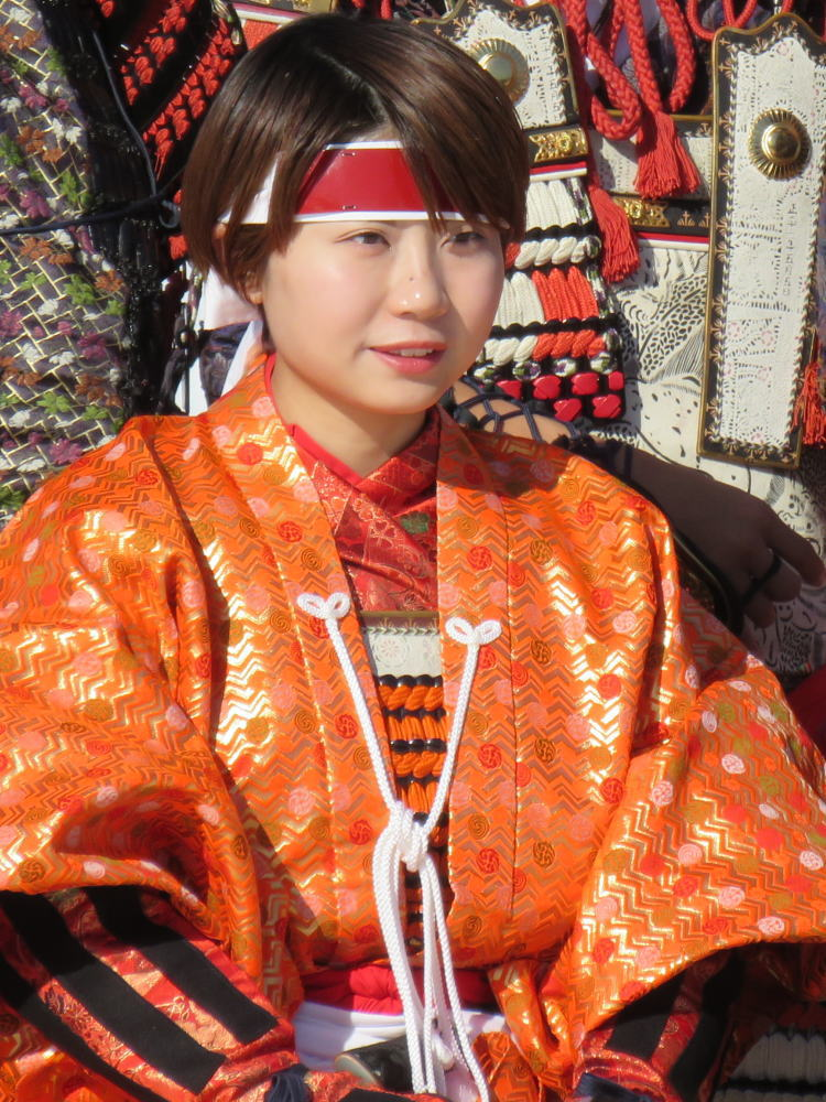 将棋棋士の石本さくら（令和元年年１１月、姫路市で行われた人間将棋にて）